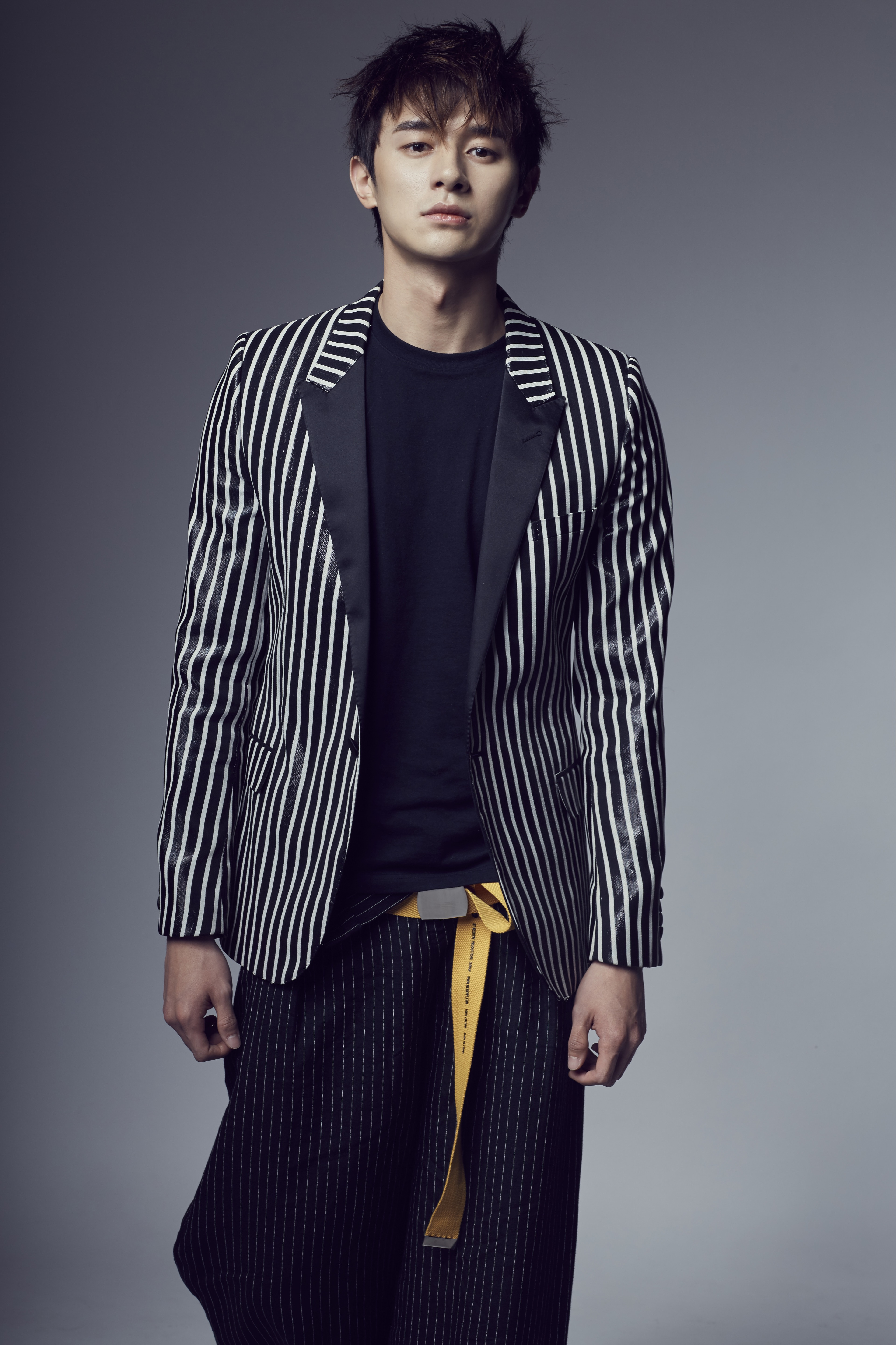 張軒睿Derek Chang